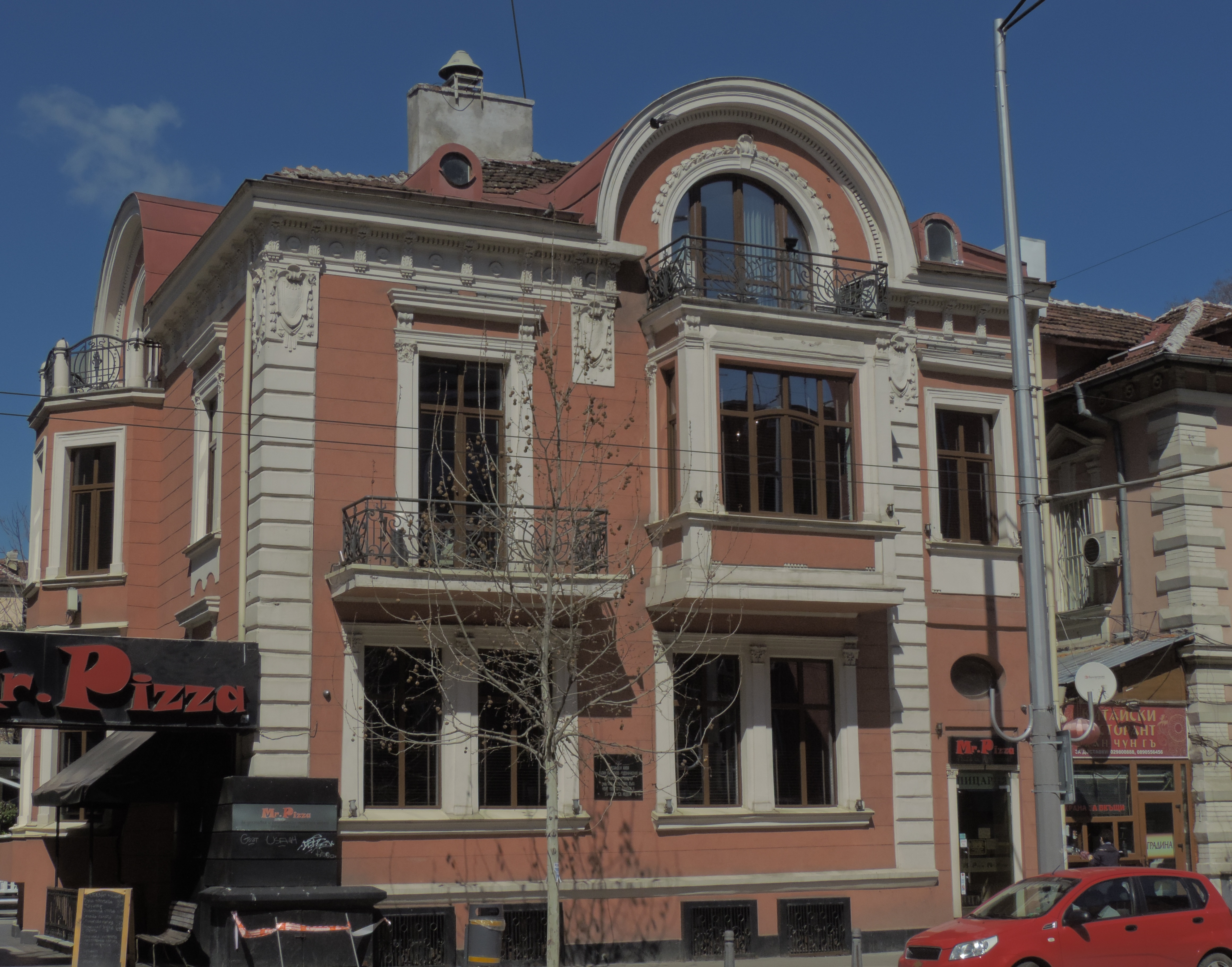 Домът на Калин Найденов на адрес ул. „Васил Левски“ № 53, София.